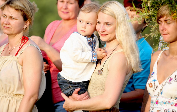 Russian Rodnover women in Krasotinka, Kaluga, Russia.